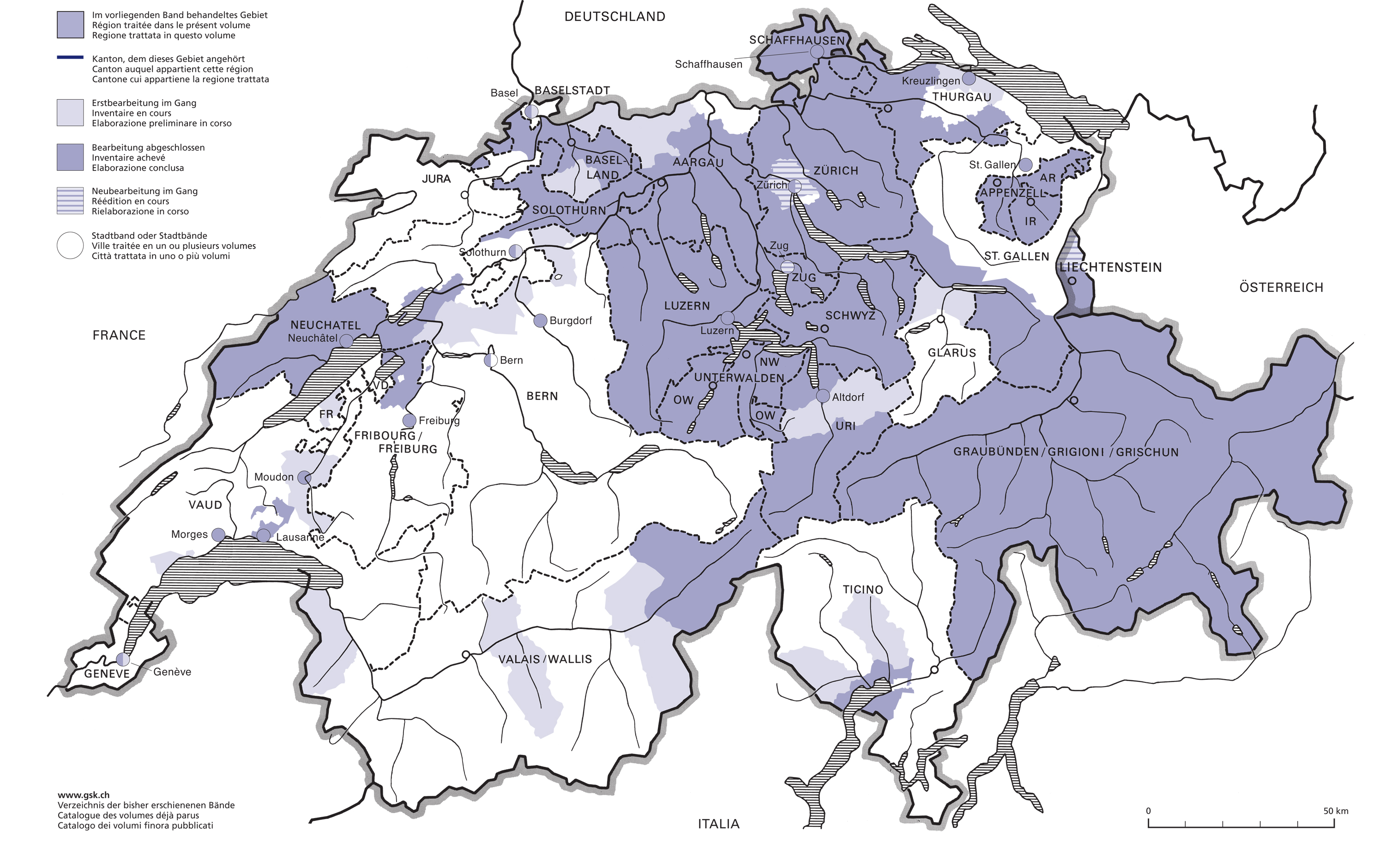 Übersichtskarte des Bearbeitungstandes der Buchreihe Die Kunstdenkmäler der Schweiz. Herausgegeben von der Gesellschaft für Schweizerische Kunstgeschichte. Bearbeitungsstand: November 2010